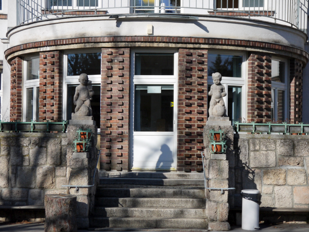 Am Tivoli